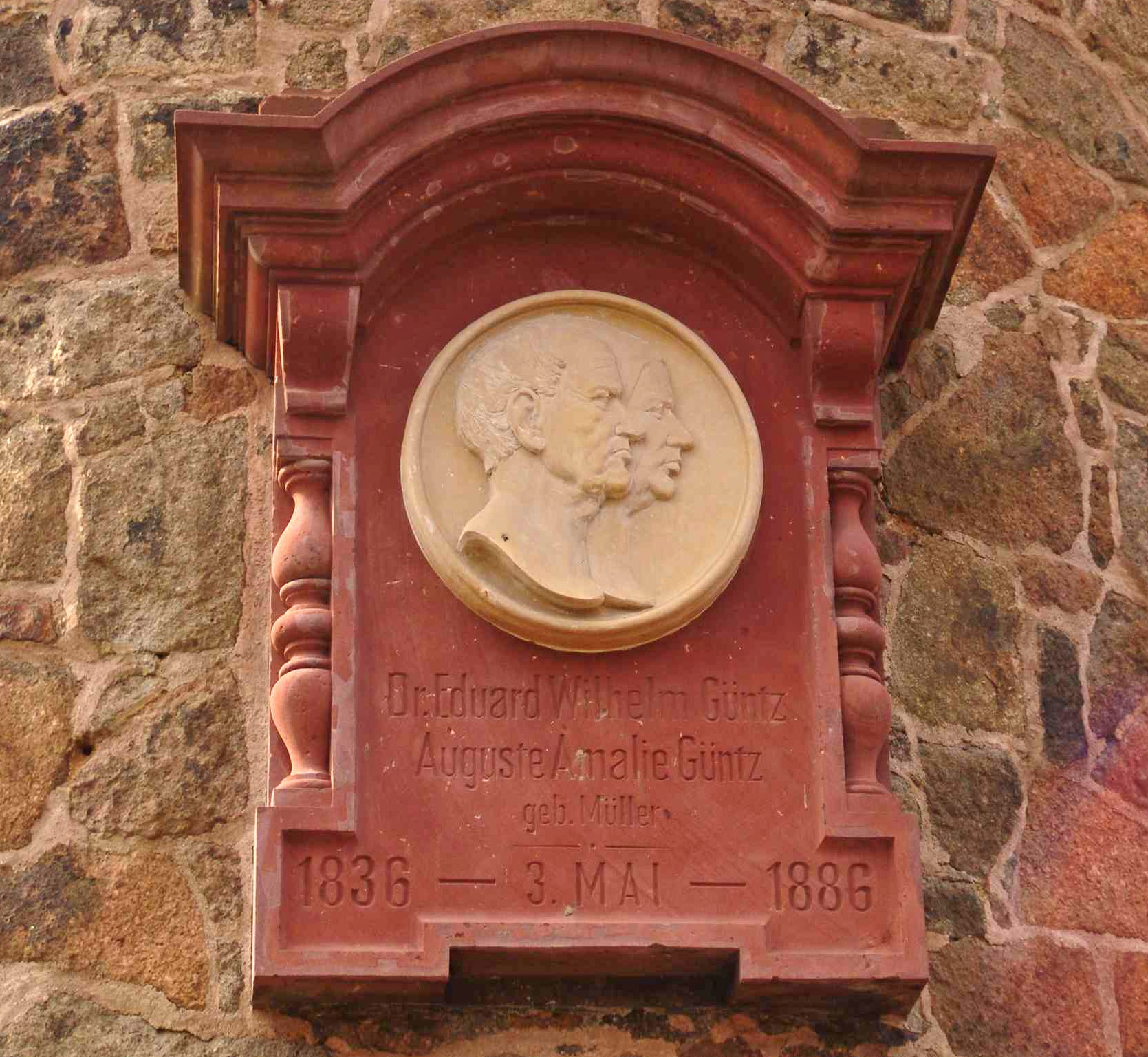 Nahaufnahme des Denkmalturms im Güntz-Park an der Schönbachstraße (2005). Dr. Eduard Wilhelm Güntz war Begründer und Direktor der 1836 in Thonberg eröffneten Irren- und Pflege-Anstalt.